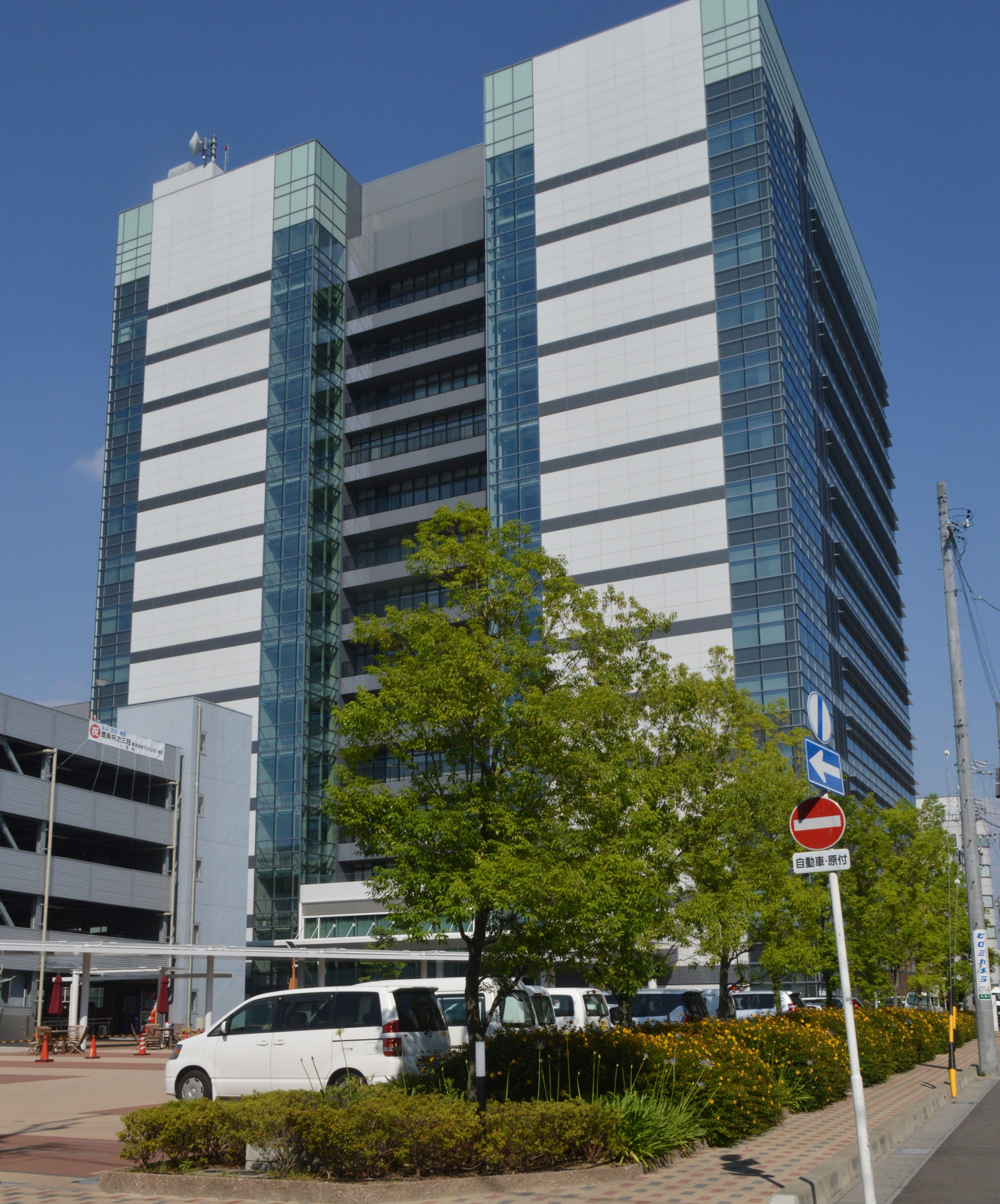 愛知県一宮市にある一宮市役所。